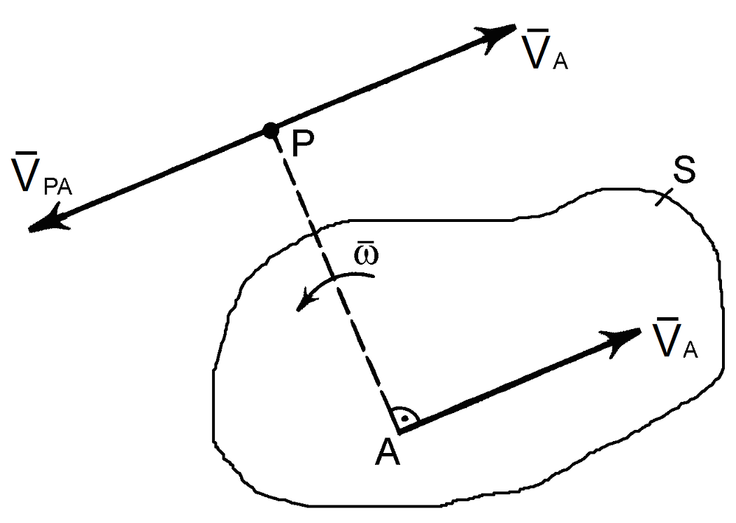 Доведення наявності миттєвого центру швидкостей для загального випадку плоскопаралельного руху: Доведення наявності миттєвого центру швидкостей для загального випадку плоскопаралельного руху